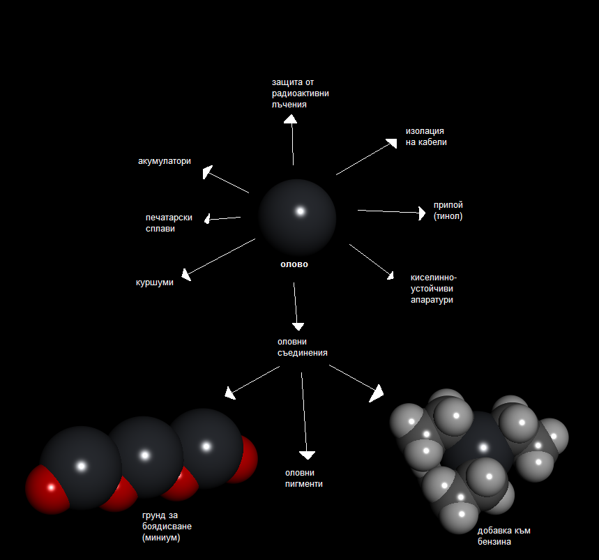 Приложение на оловото